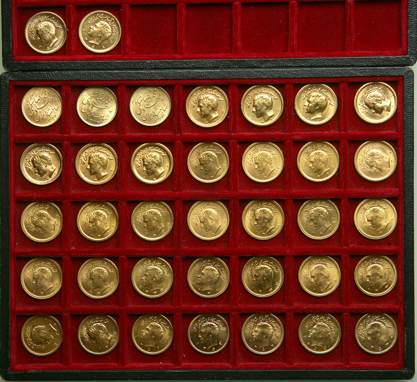 مجموعه ای از سکه های یک پهلوی از 1322 تا 1358